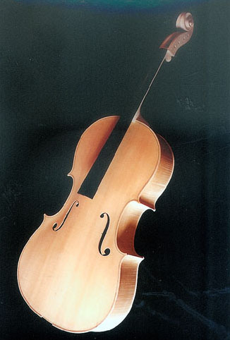 Készülő cselló